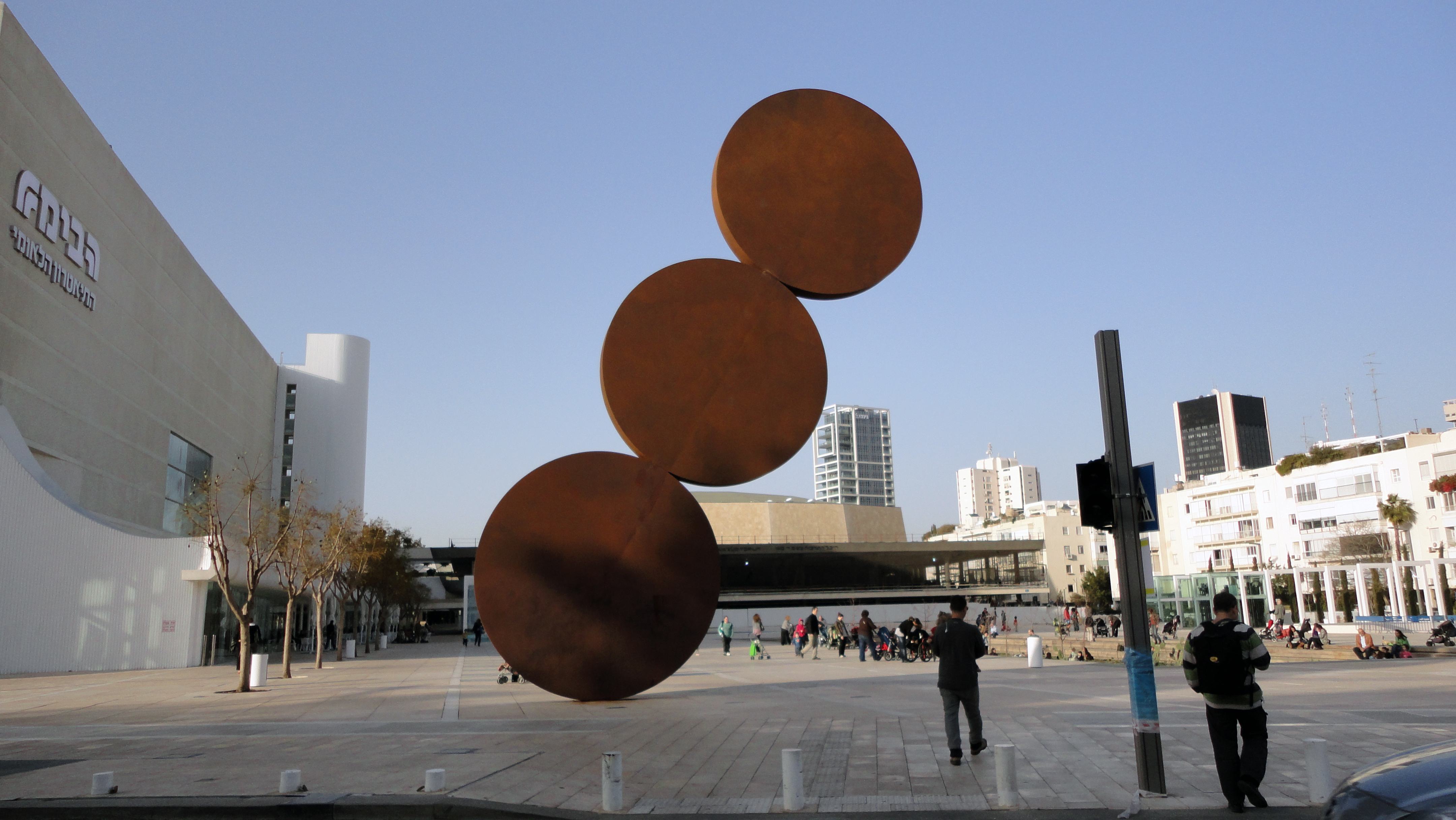 Sculpture